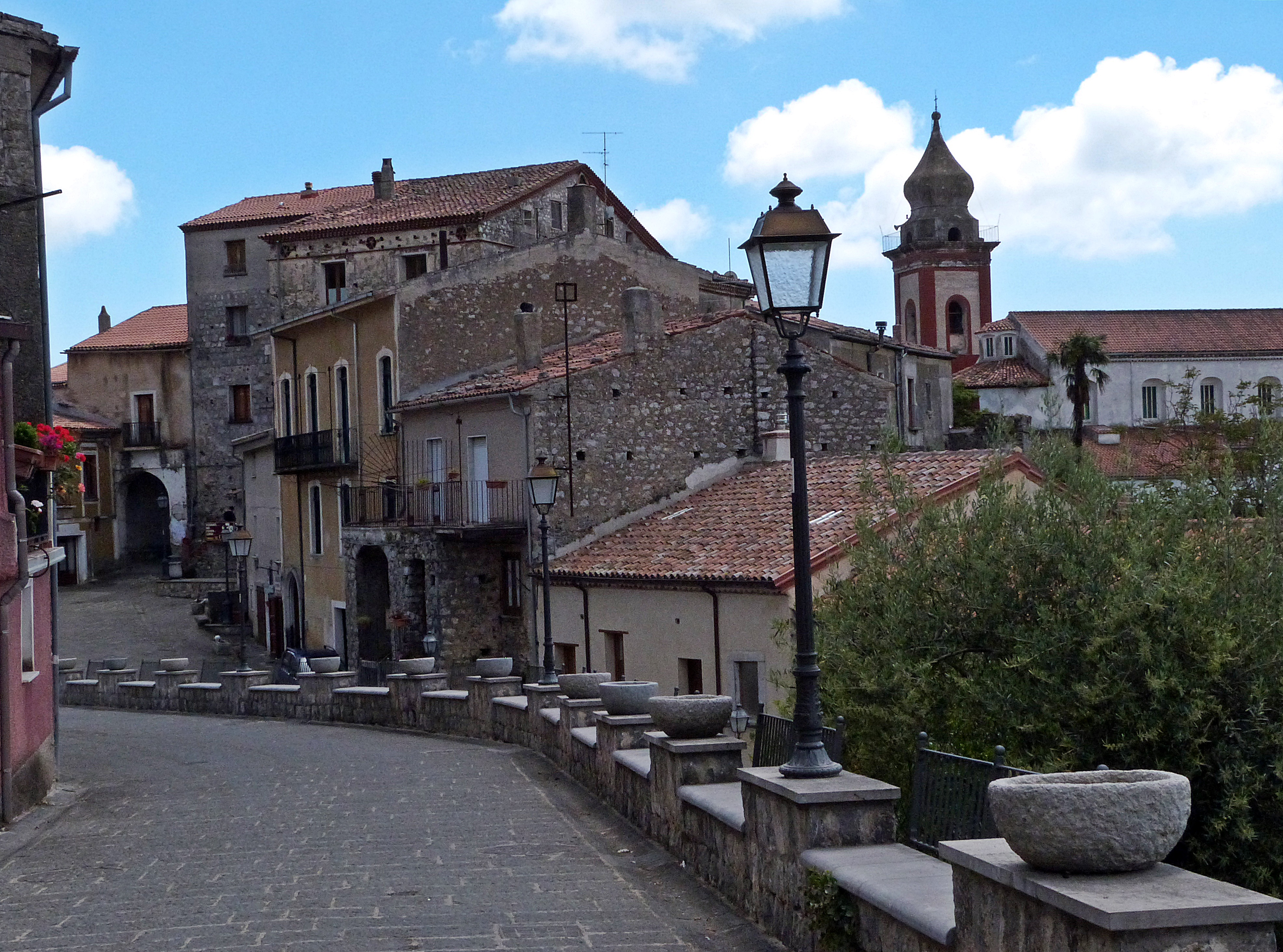 Morigerati